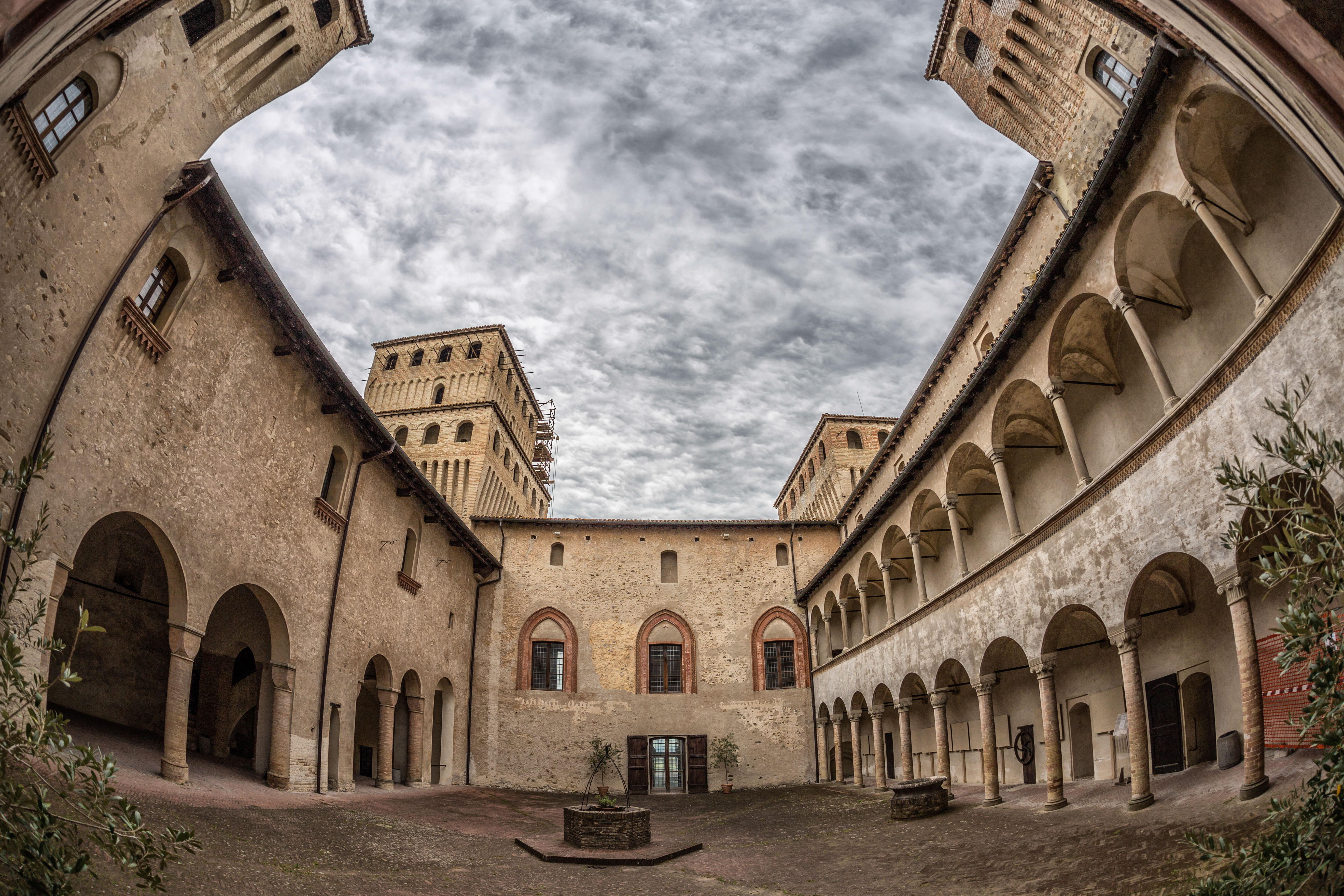 Castello di Torrechiara (esternamente il primo giro delle mura del castello, prima dell'entrata al portone d'ingresso) - MIBAC This is a photo of a monument which is part of cultural heritage of Italy.